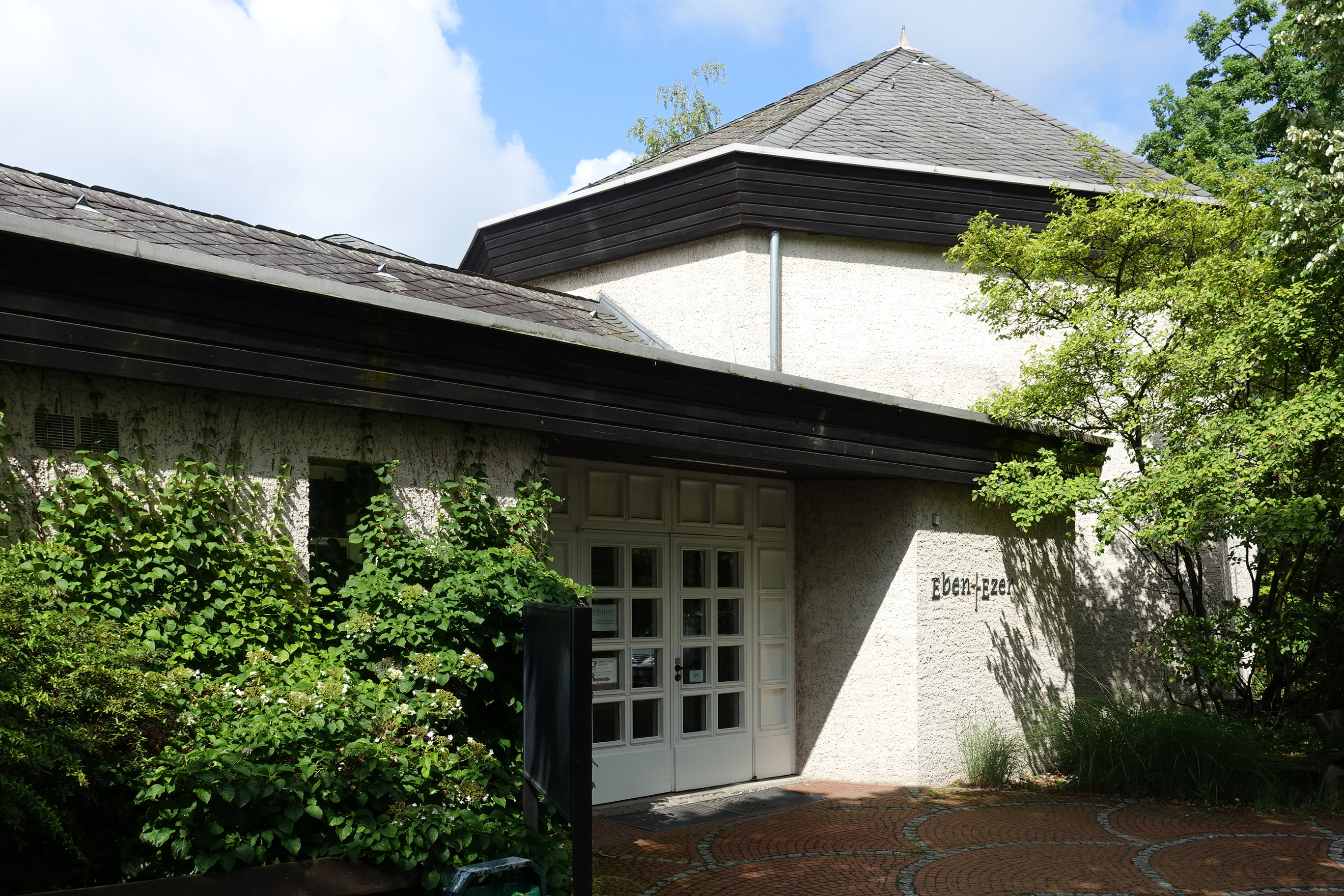 Rechts vom Eingangsbereich befindet sich die Kapelle.